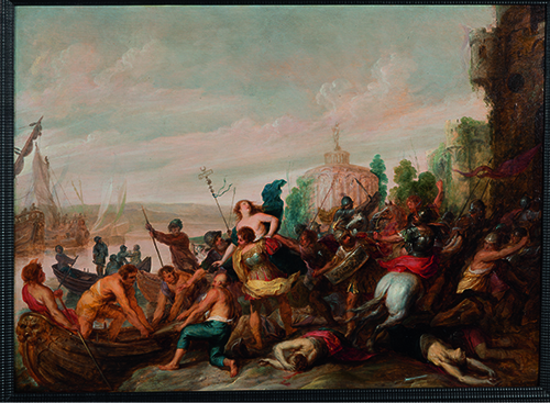 Vincent I Malo, Ontvoering van Helena, ?, olieverf op paneel, 45 x 63 x 0,5 cm.